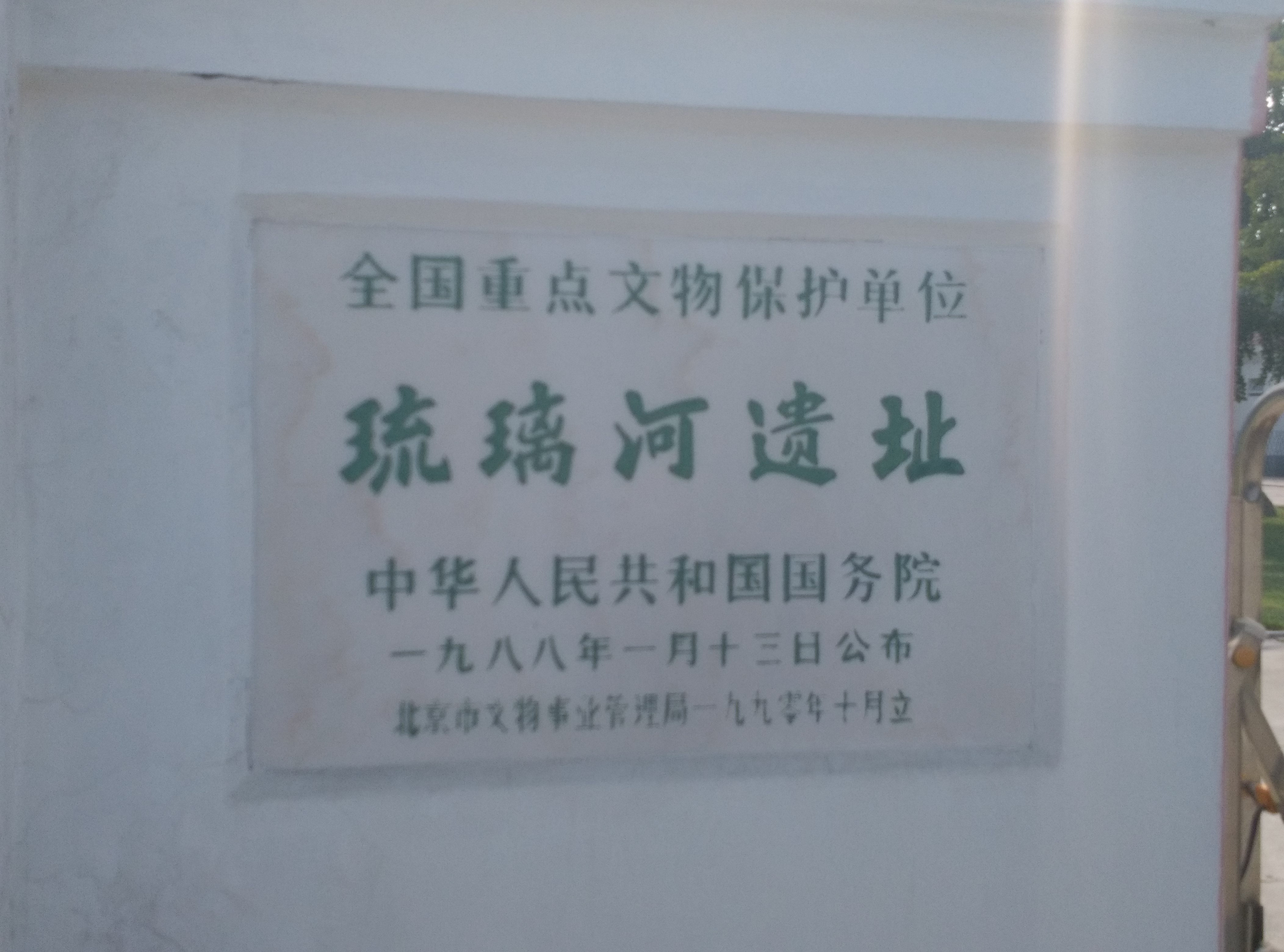 中文（中国大陆）: 琉璃河商周遗址全国重点文物保护单位碑